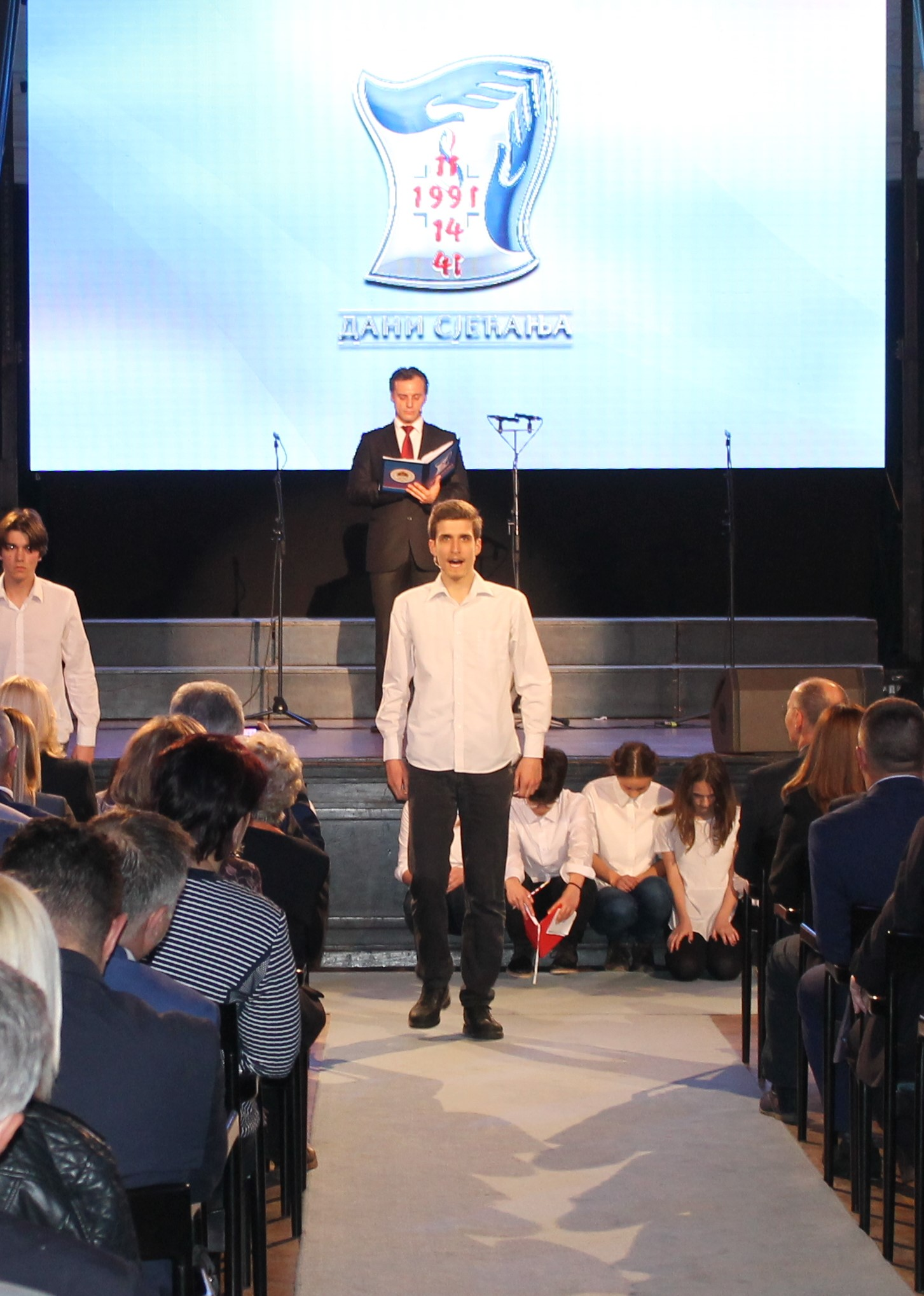 Srpski (latinica): Дани сјећања 2018.